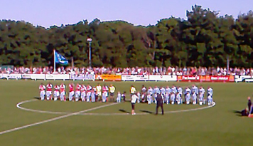 Foto van voorafgaand aan het streekduel tussen AZ en FC Den Helder op 23 juni 2009. Foto is gemaakt met mobiele telefoon en relatief van lage kwaliteit.